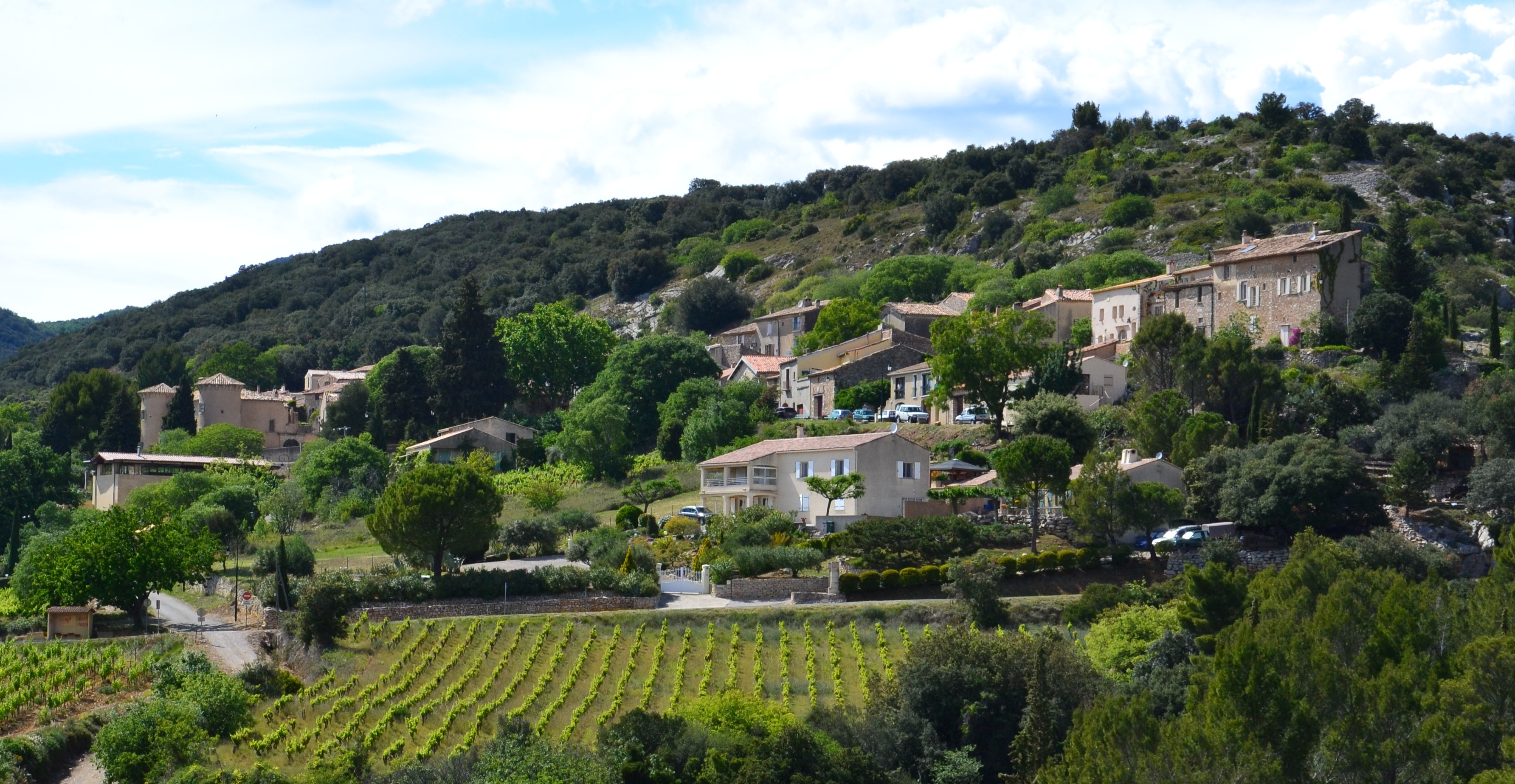 Vue sur Arboras (Hérault).